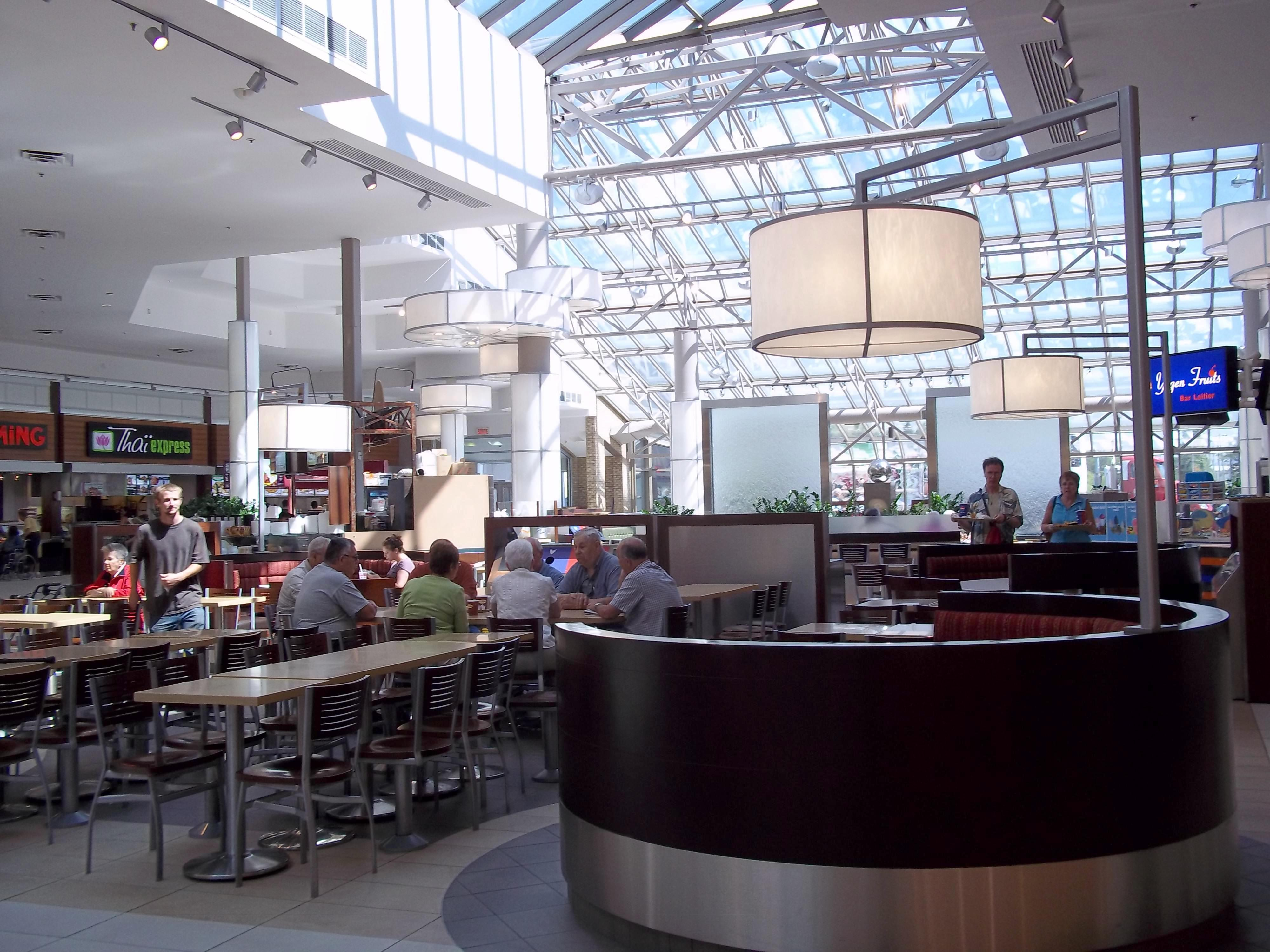 Vue intérieure du Carrefour Angrignon, LaSalle, Montréal, Québec